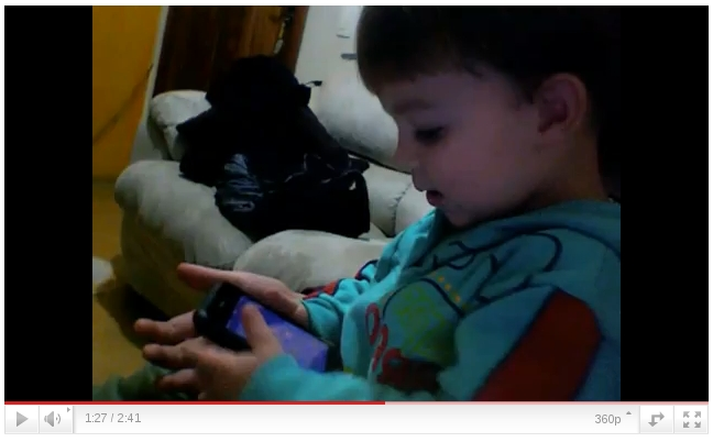 print de youtube